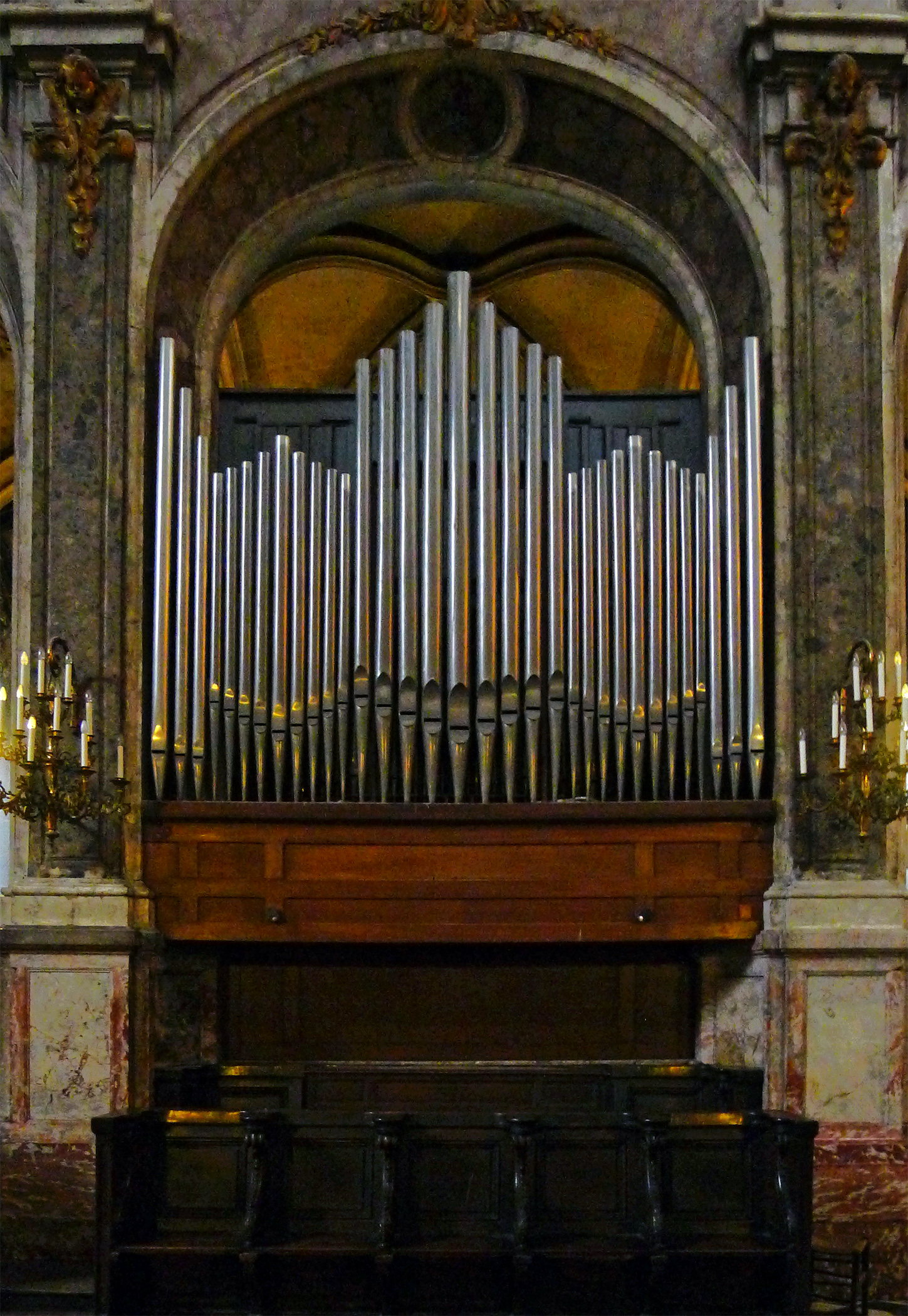 Église Saint-Merri (orgue de choeur) - Paris IV